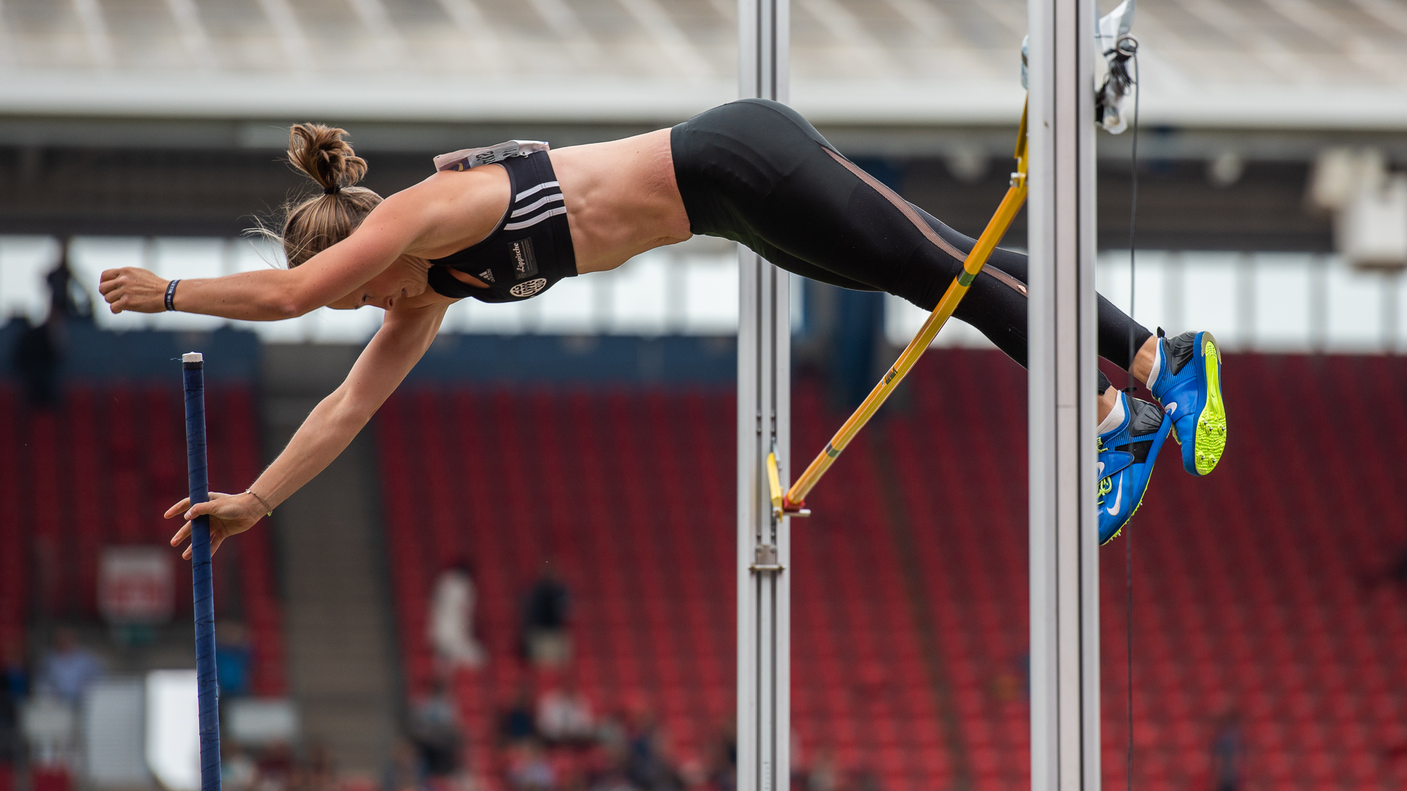 DLV,Desiree Singh,Deutsche Leichtathletik Meisterschaften 2018,Deutscher Leichtathletik-Verband,LG Lippe-Süd,Max-Morlock-Stadion,Pole vault,Stabhochsprung